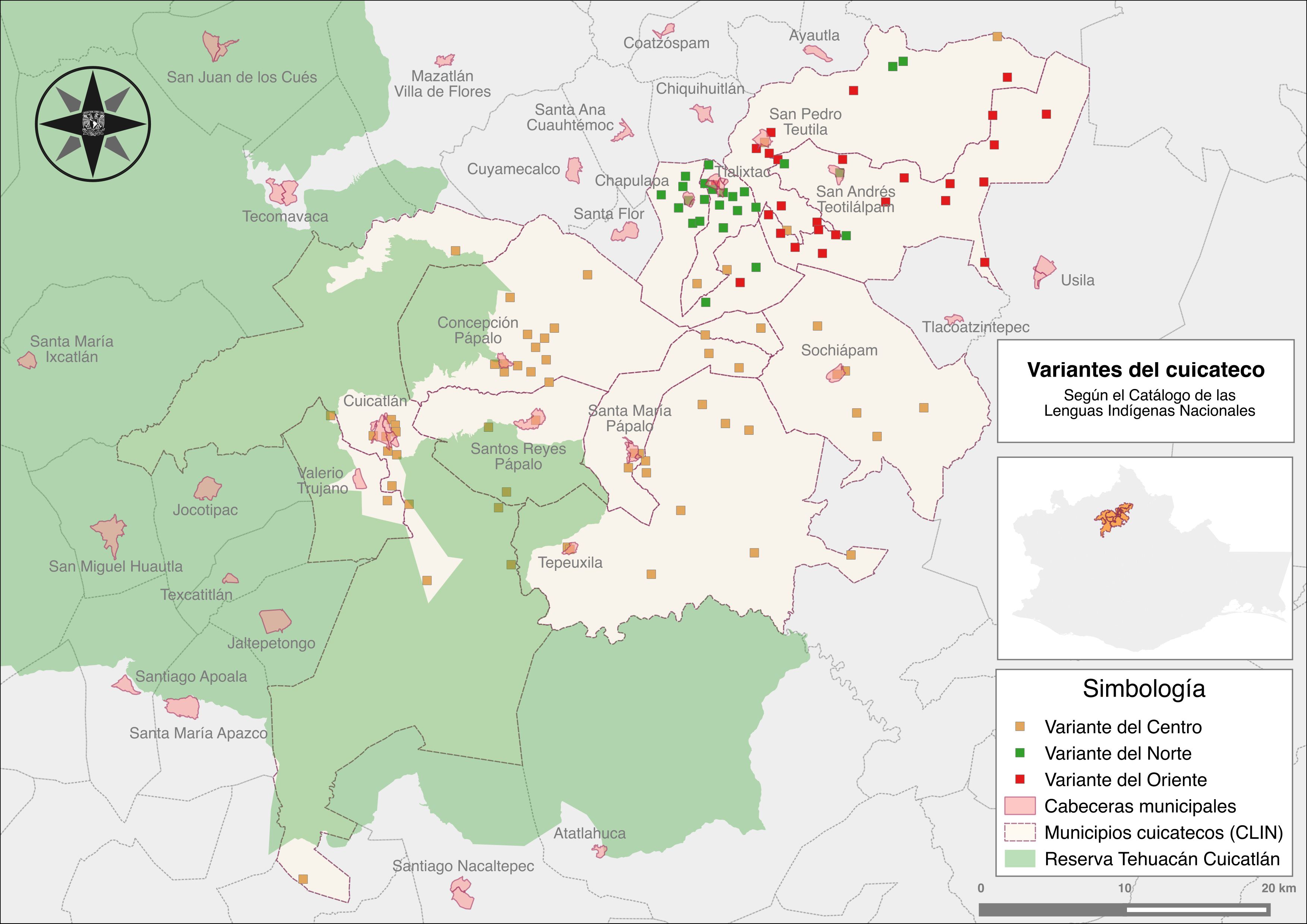 Mapa de creación Propia con las variantes de cuicateco según el INALI (2009)